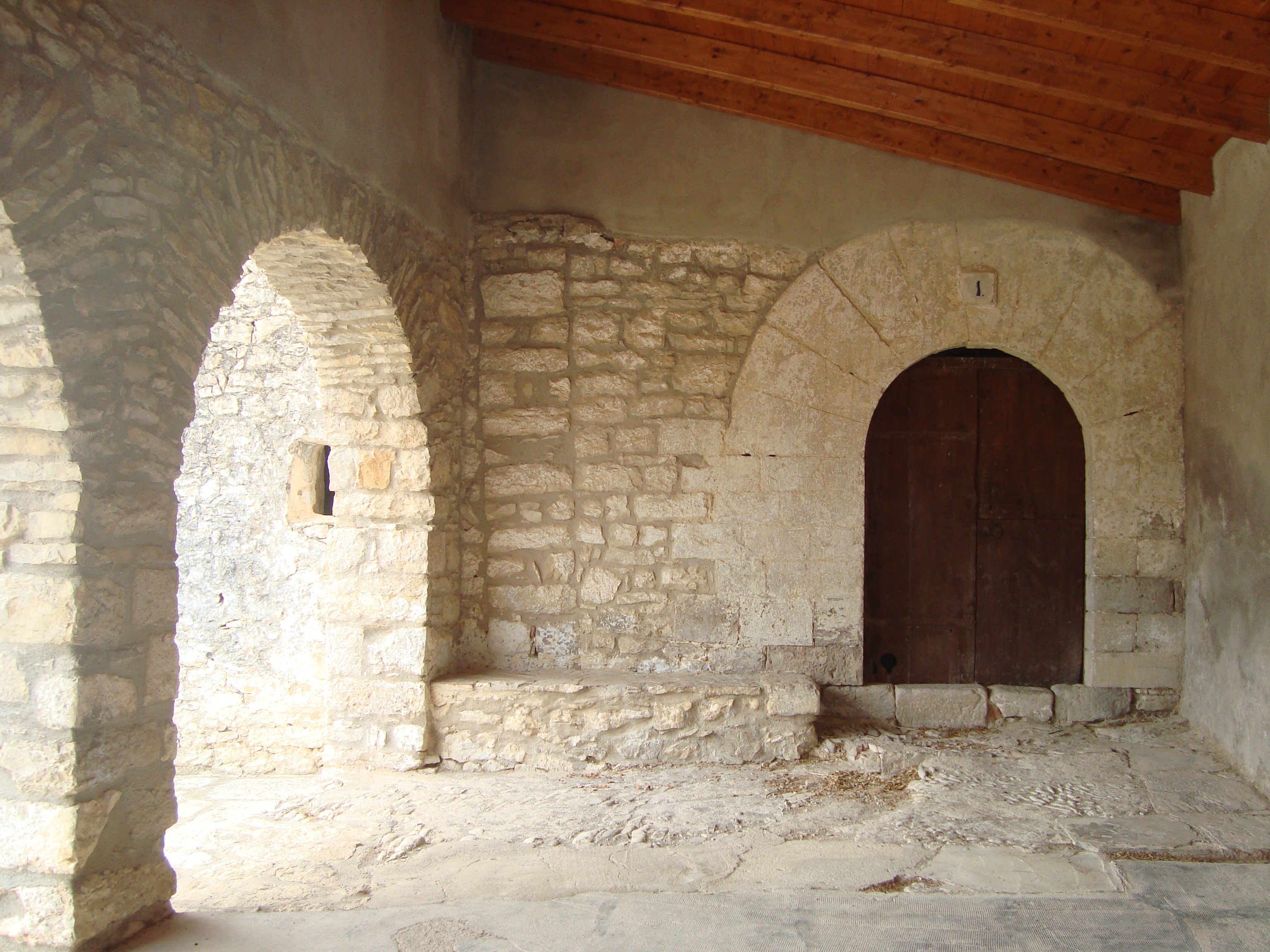 Antic local de les escoles de La Barcella (Xert)